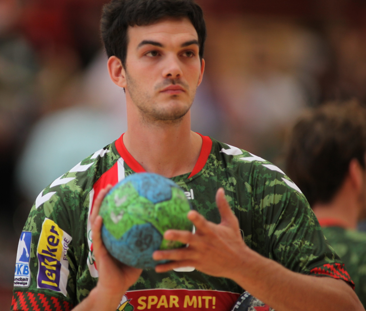 Petar Nenadić, Spieler der Füchse Berlin am 16. August 2014 beim Sparkassen-Cup in Ehingen.